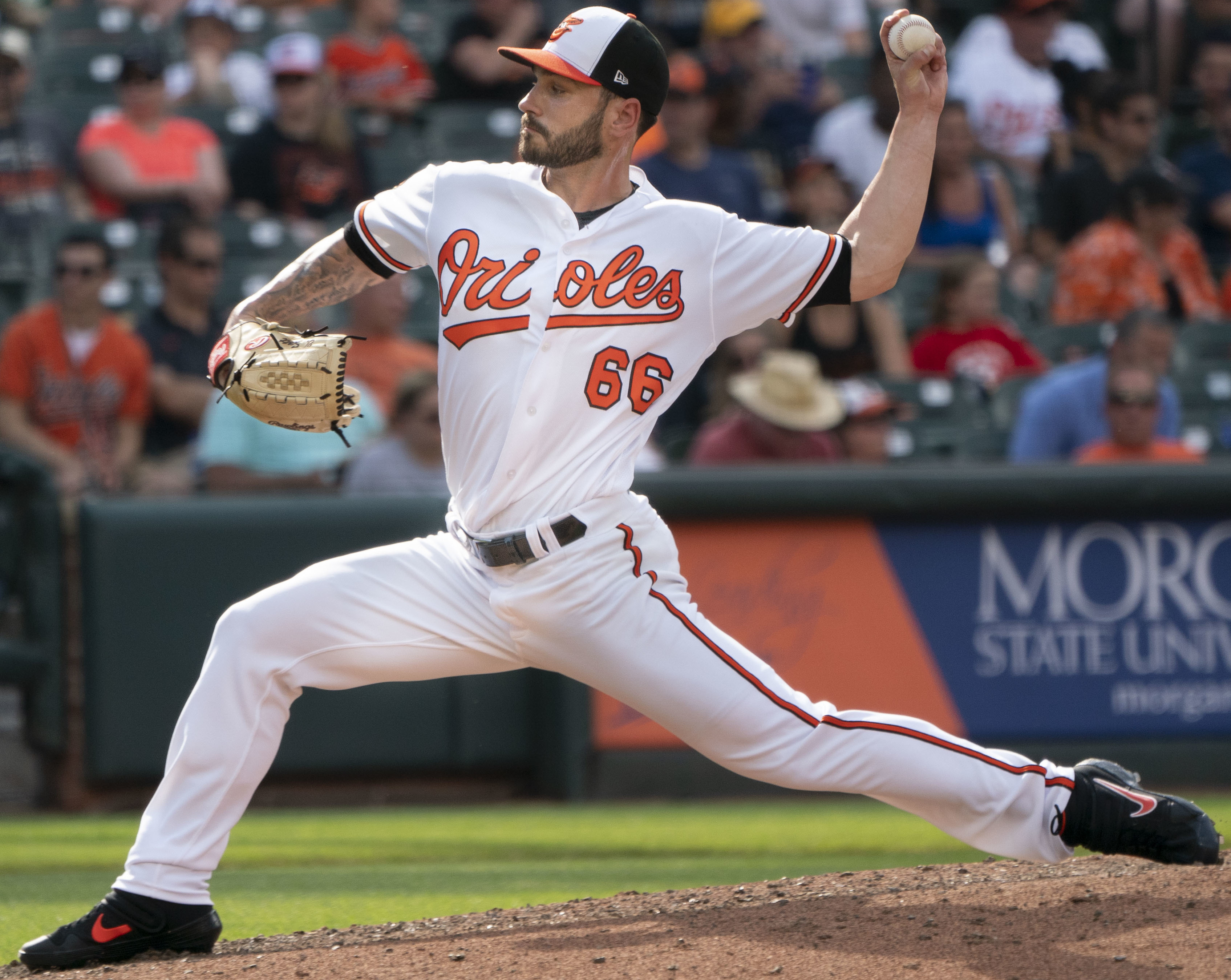 Padres at Orioles 6/26/19